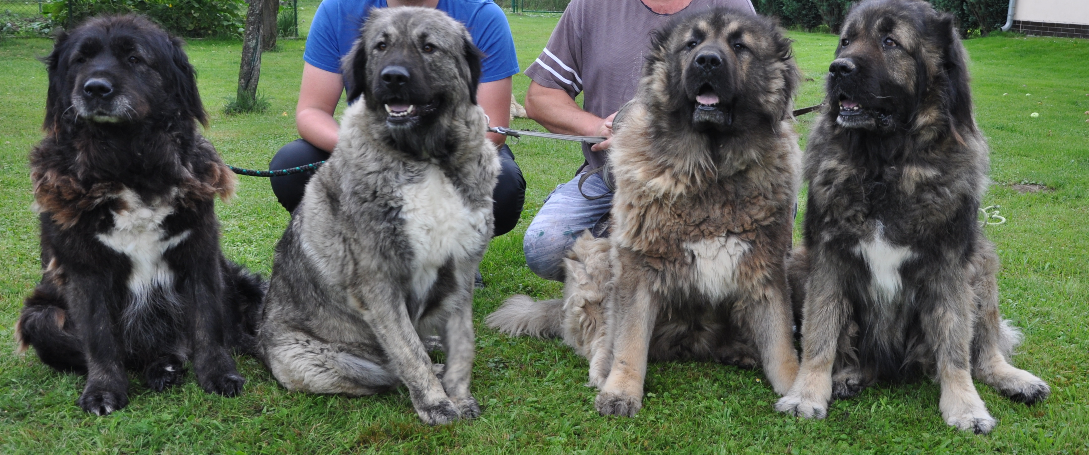 Arin,Kayla,Faro,Viktor